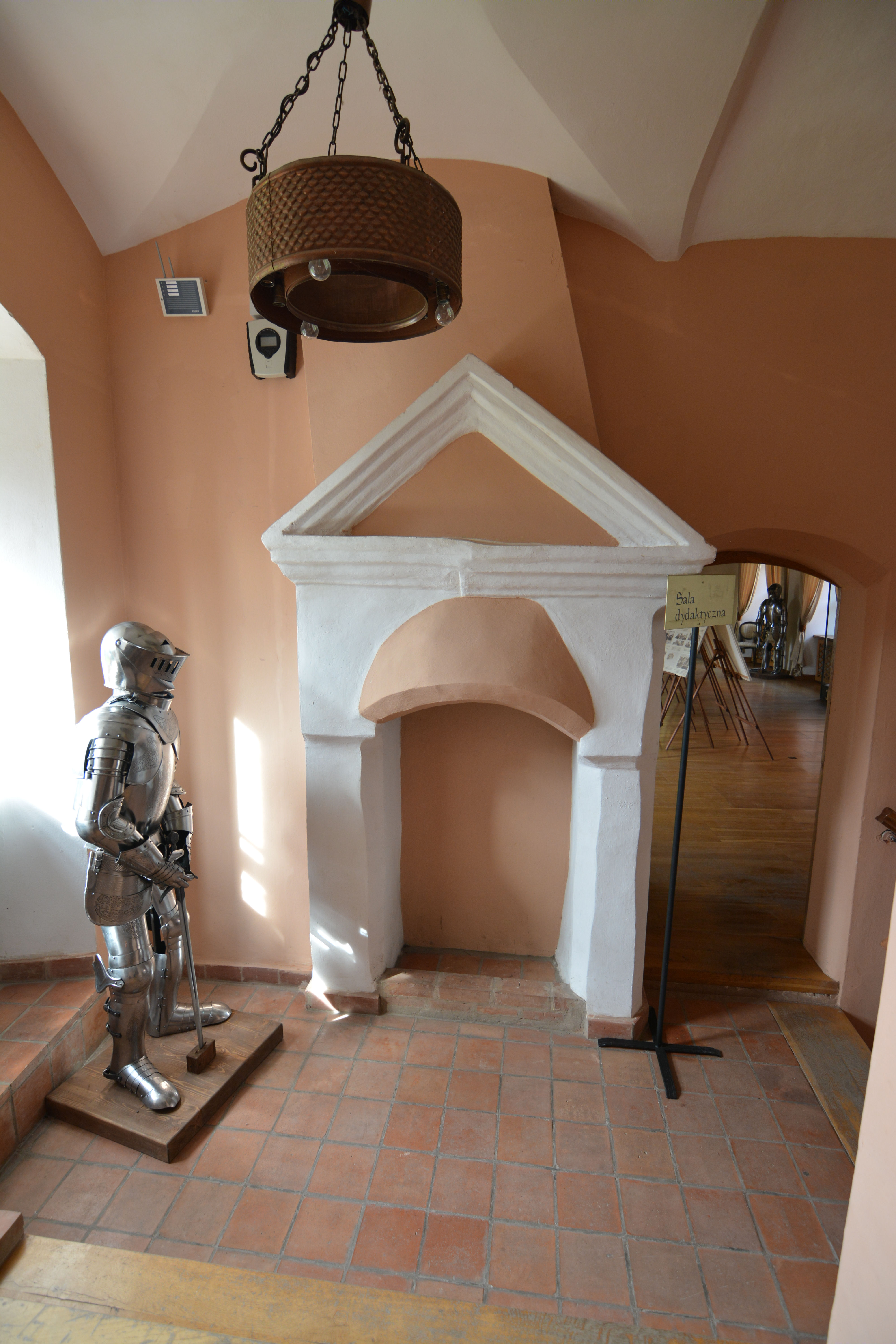 Pęzino - zamek, XIV, 1 poł. XVI, 1600, XIX